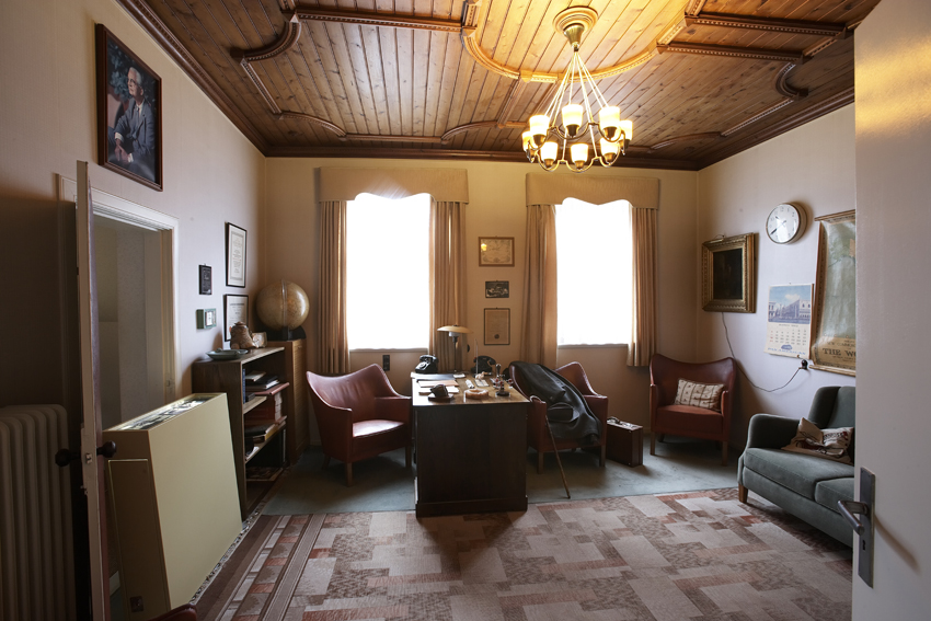 Mads Clausens kontor som det står der endnu i Mads Clausen Museet i Danfoss Universe. PH lampe på skrivebordet. Lampen i loftet? Hvad er det for lænestole?